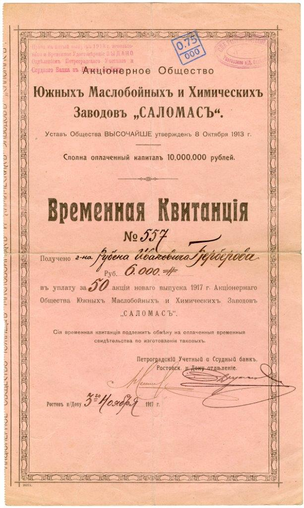 Временная квитанция, именная, в 6 тыс. руб., в уплату за 50 акций нового выпуска 1917 г. Акционерного общества Южных маслобойных и химических заводов "Саломас". Ростов-на-Дону, 3.11.1917 г.